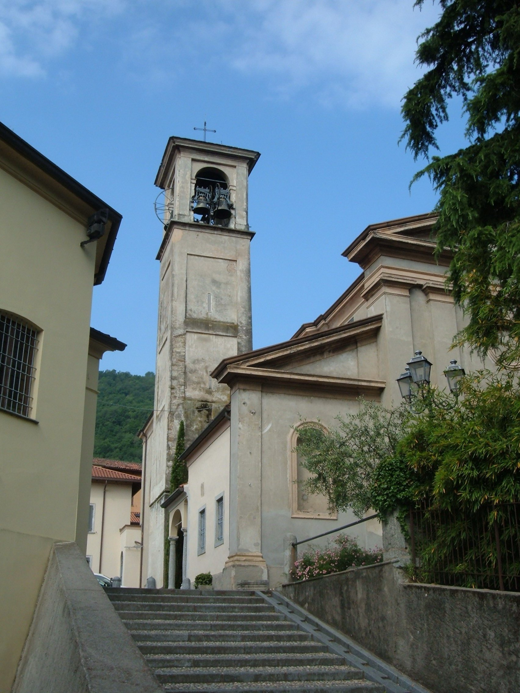 Chiesa di Santo Stefano a Garlate (prov. Lecco)